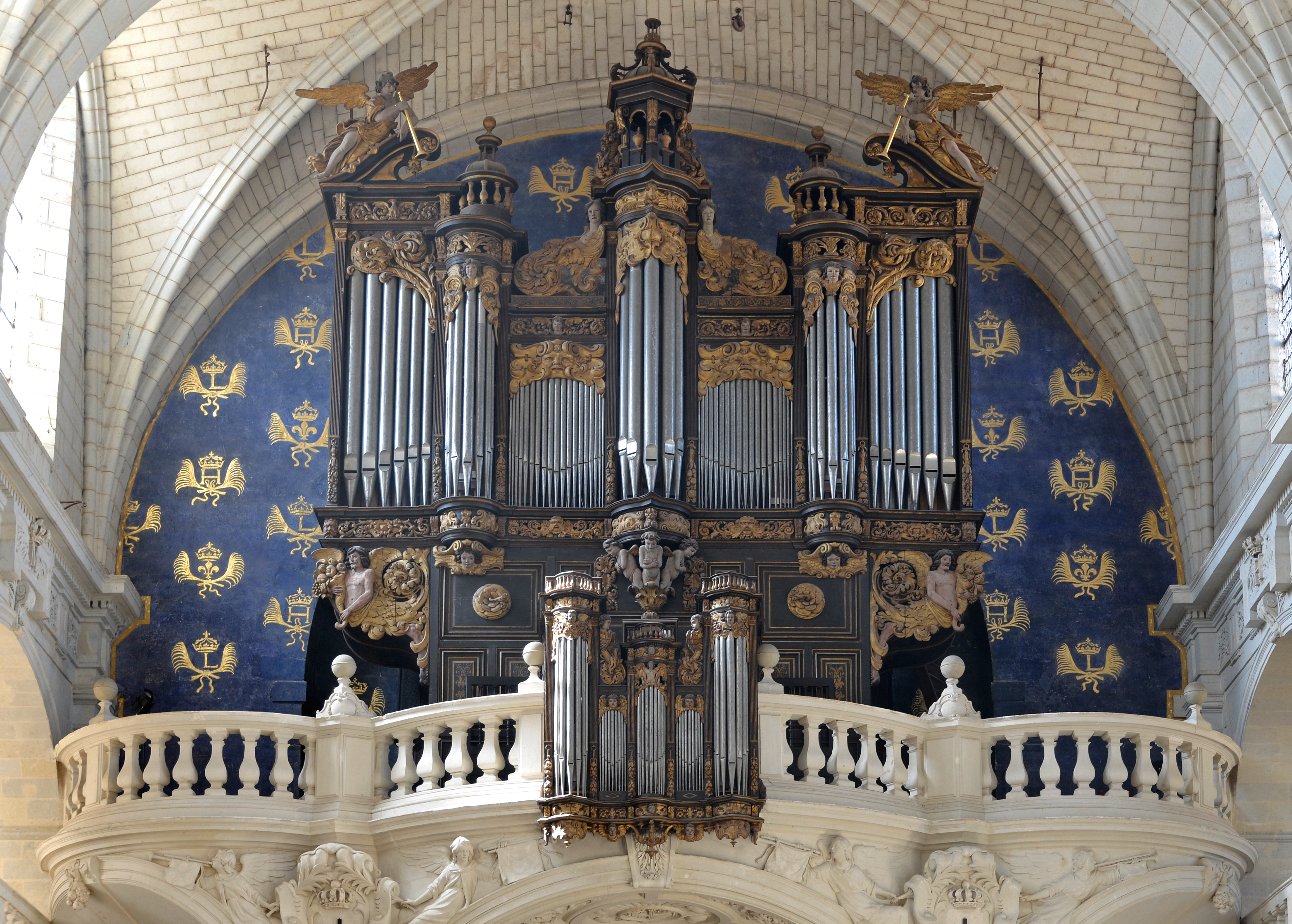 Ancien collège des Jésuites, actuellement Prytanée national militaire - La Flèche (Sarthe)